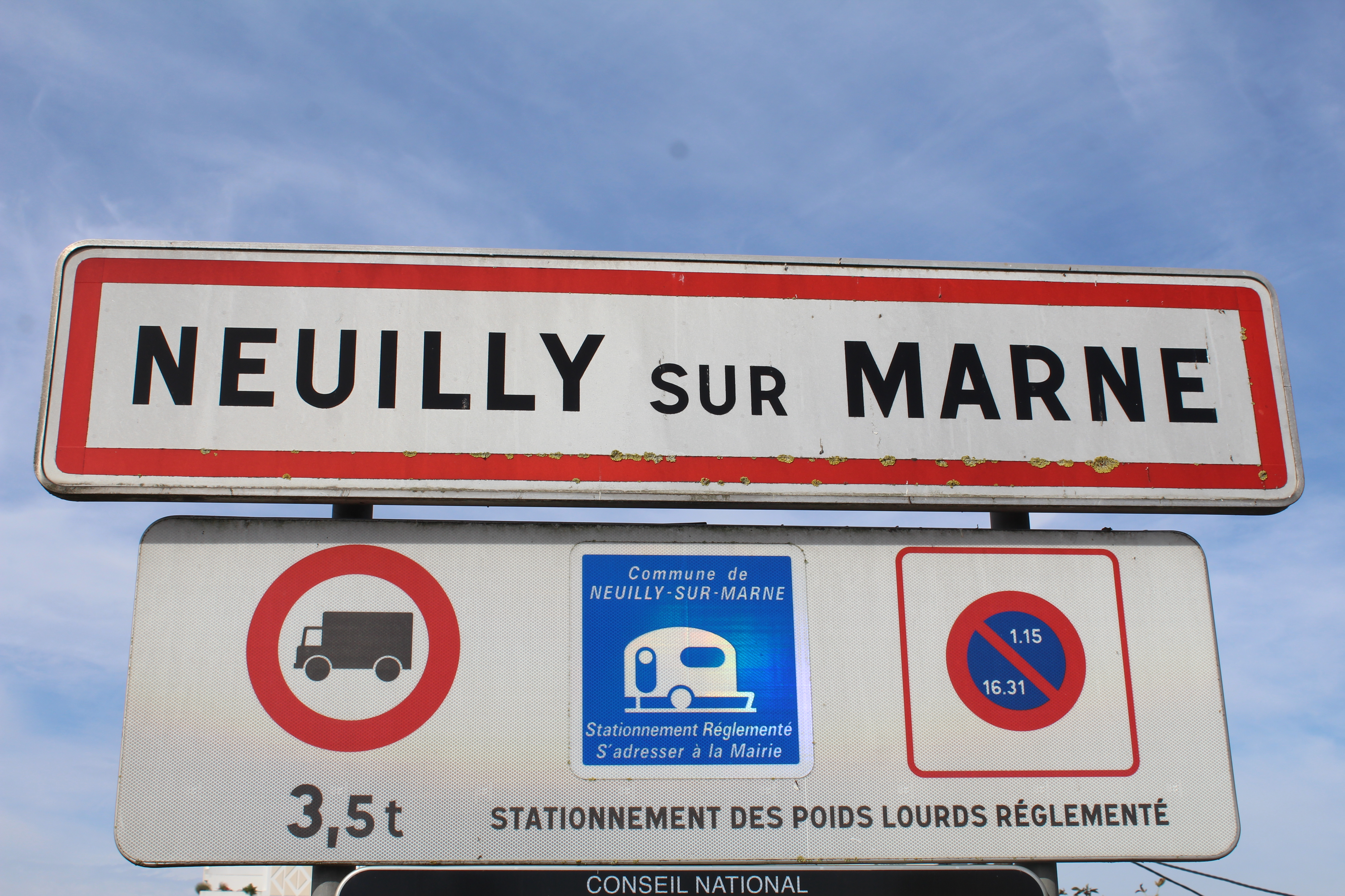 Panneau d'entrée dans Neuilly-sur-Marne.